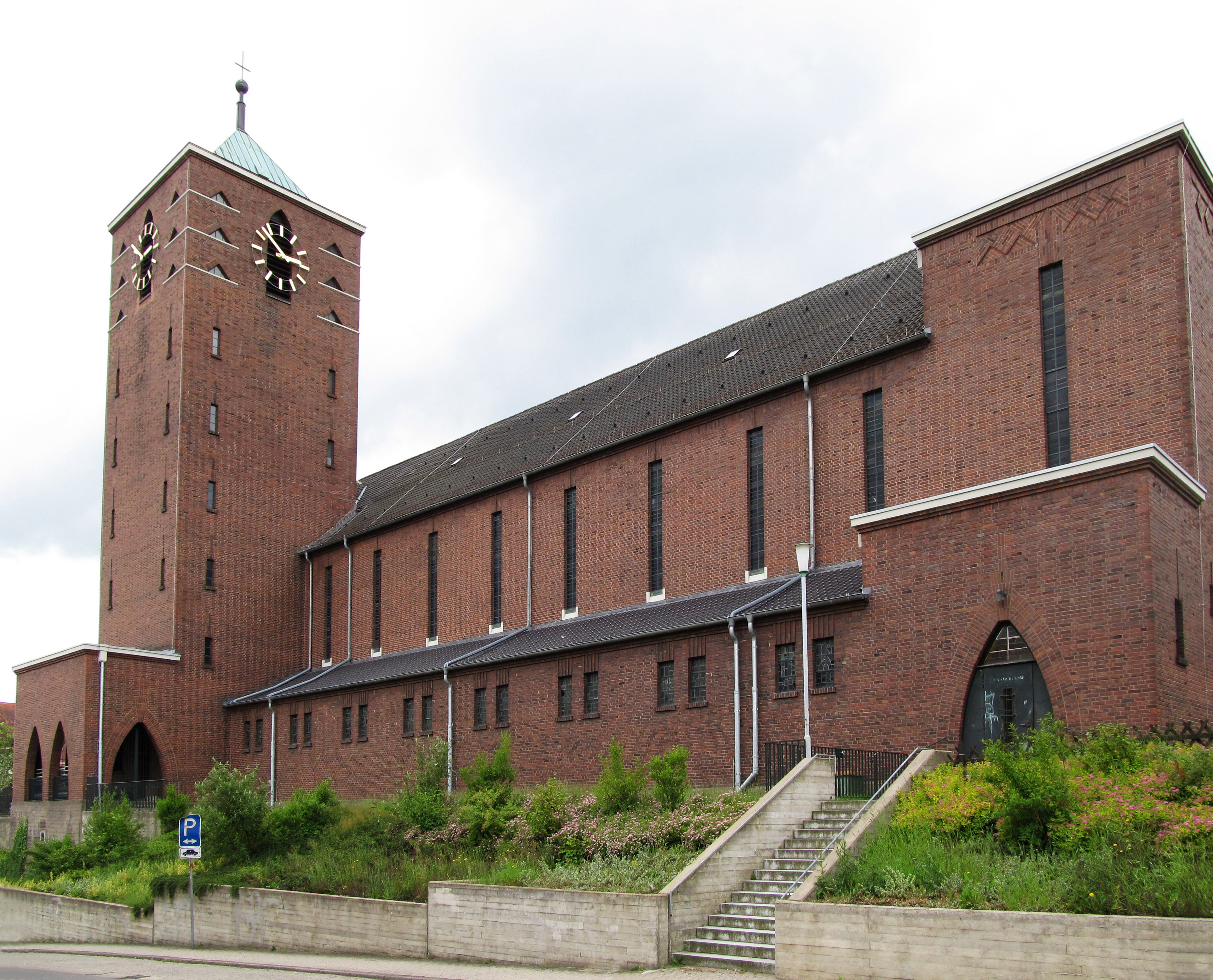 Die Kirche St. Hildegard in St. Ingbert, Saarland